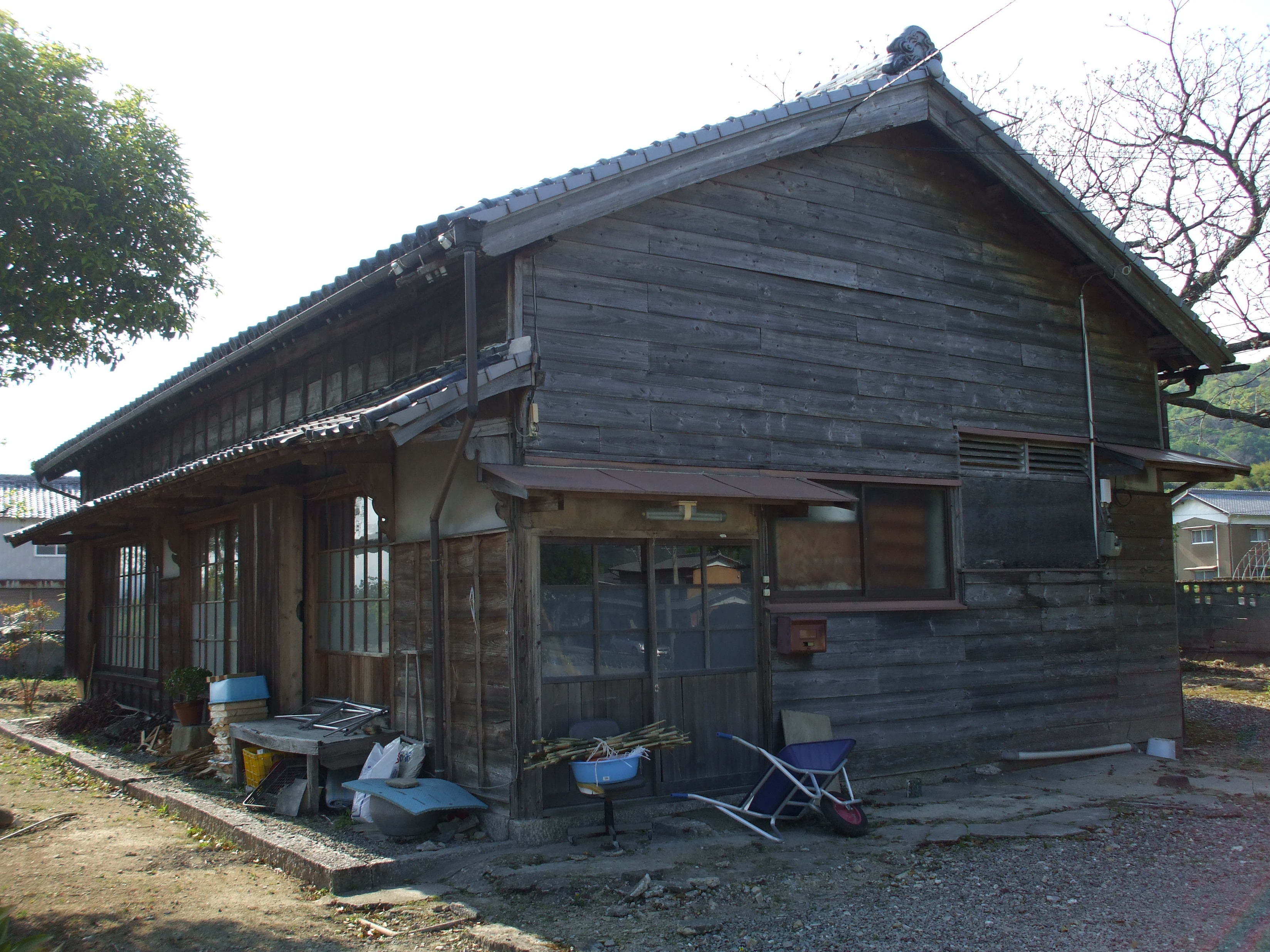 三木武夫生家。